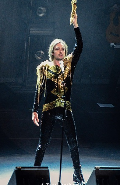 Hooker em 2018